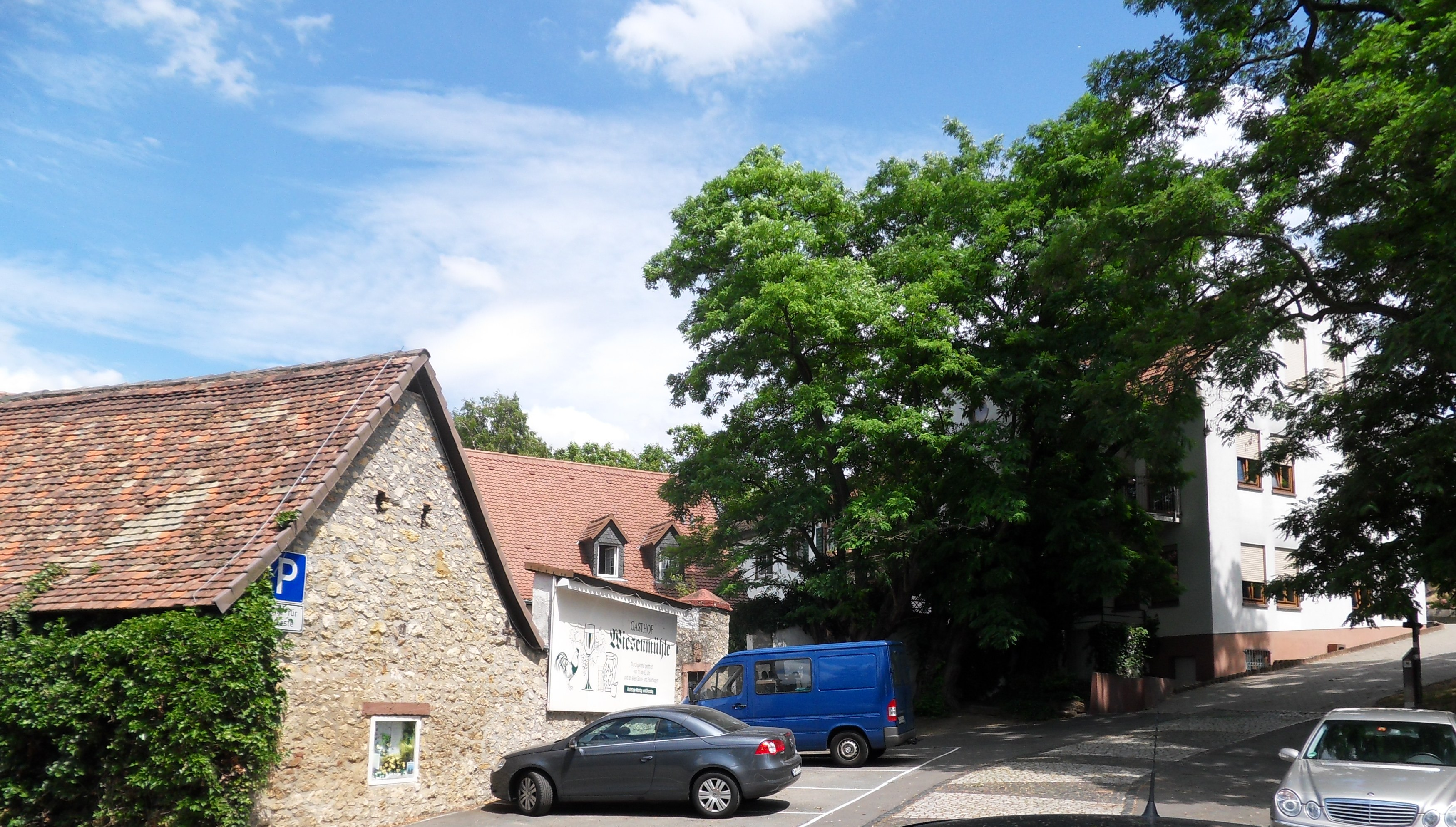 Die 1699 am Wickerbach errichtete Wiesenmühle wird als Gasthof genutzt. Nach dem Verkauf 1724 an den Mainzer Weihbischof Johann Edmund Gedult zu Jungenfeld wurde sie auch Bischofsmühle genannt und steht unter Denkmalschutz. Blick von Westen